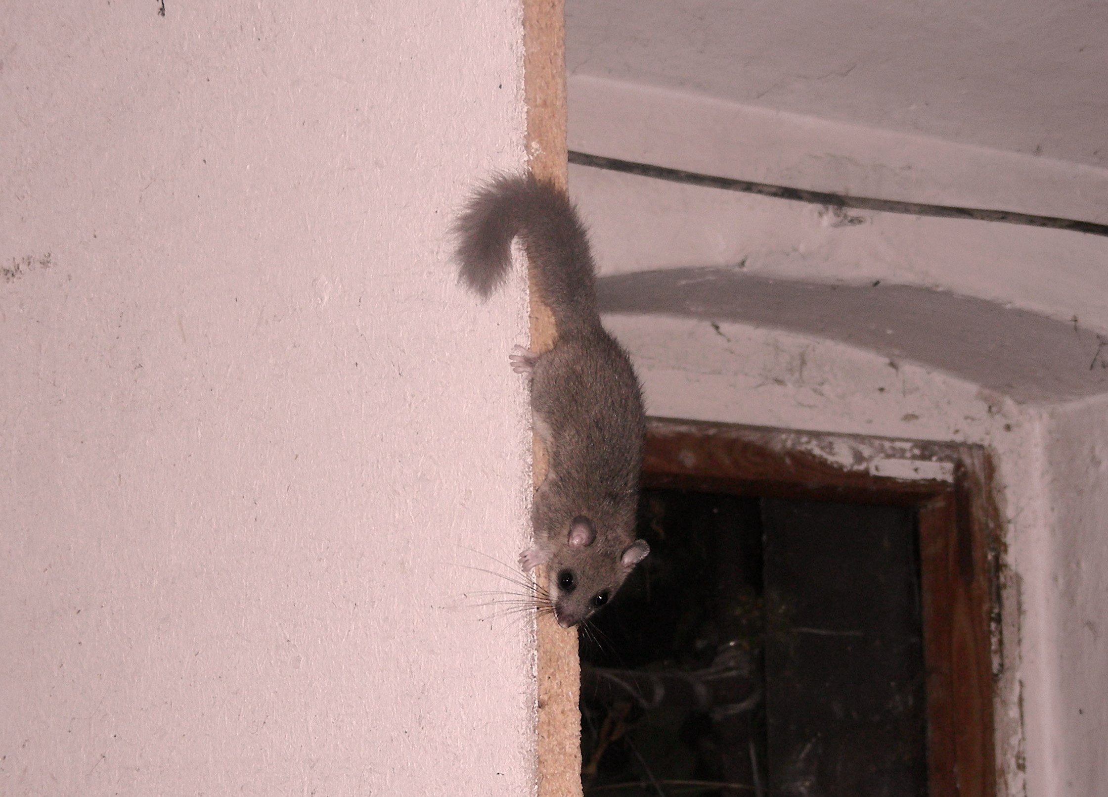 Popielica (Glis glis), miejsce: osada leśna, Zespół Przyrodniczo-Krajobrazowy Lipno, gmina Niemodlin, województwo Opolskie, Polska.